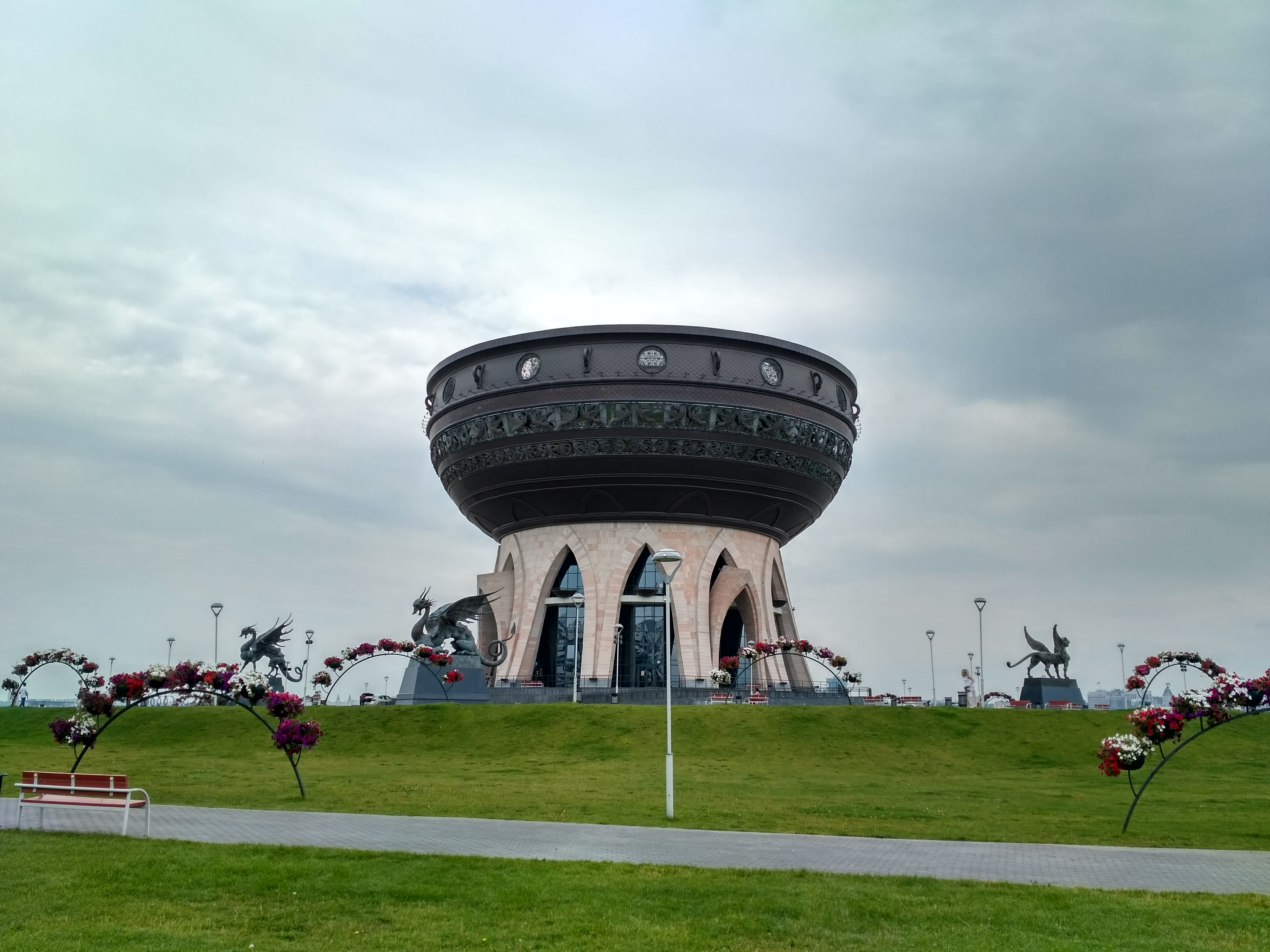 Центр семьи "Казан"